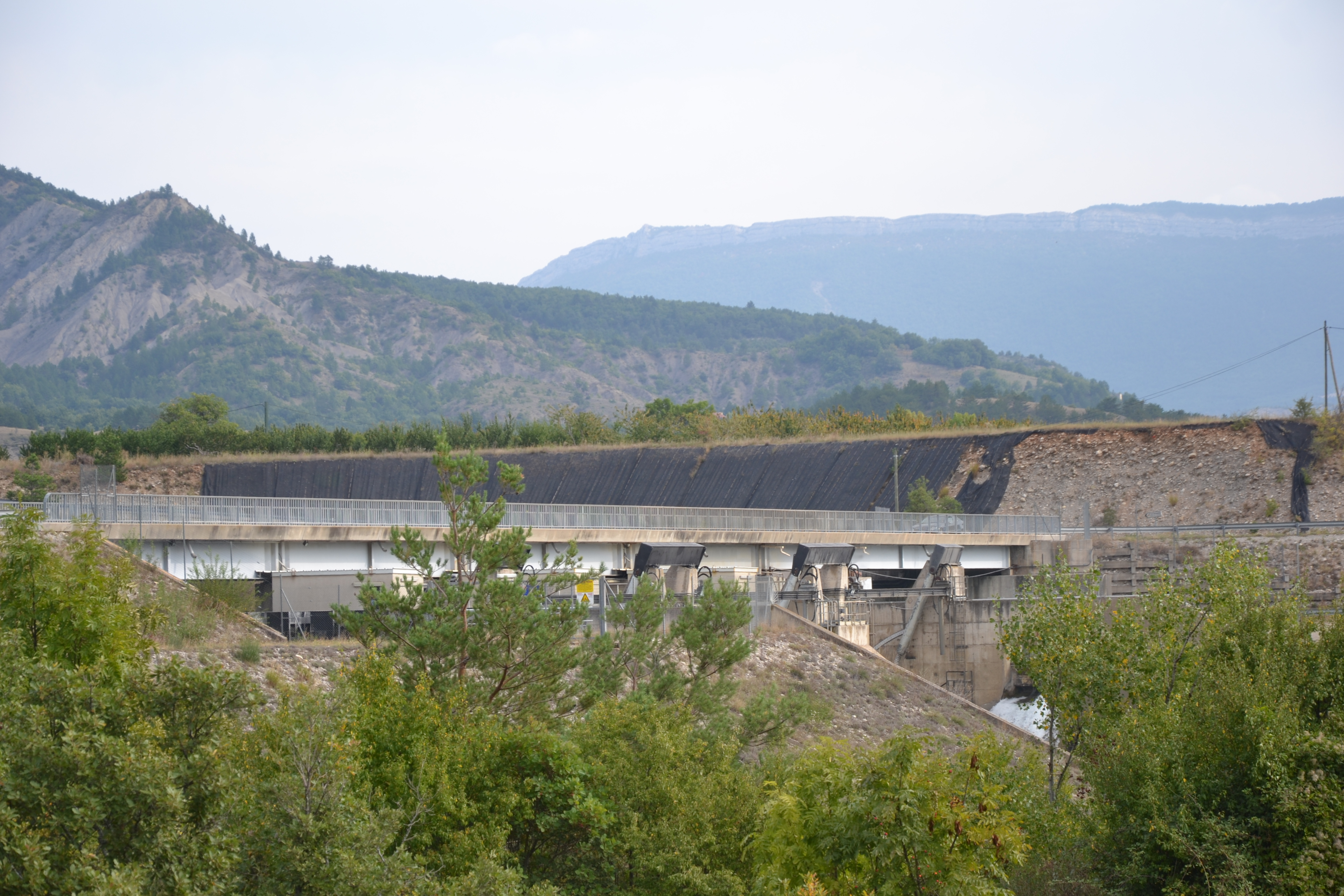 Barrage Saint Sauveur